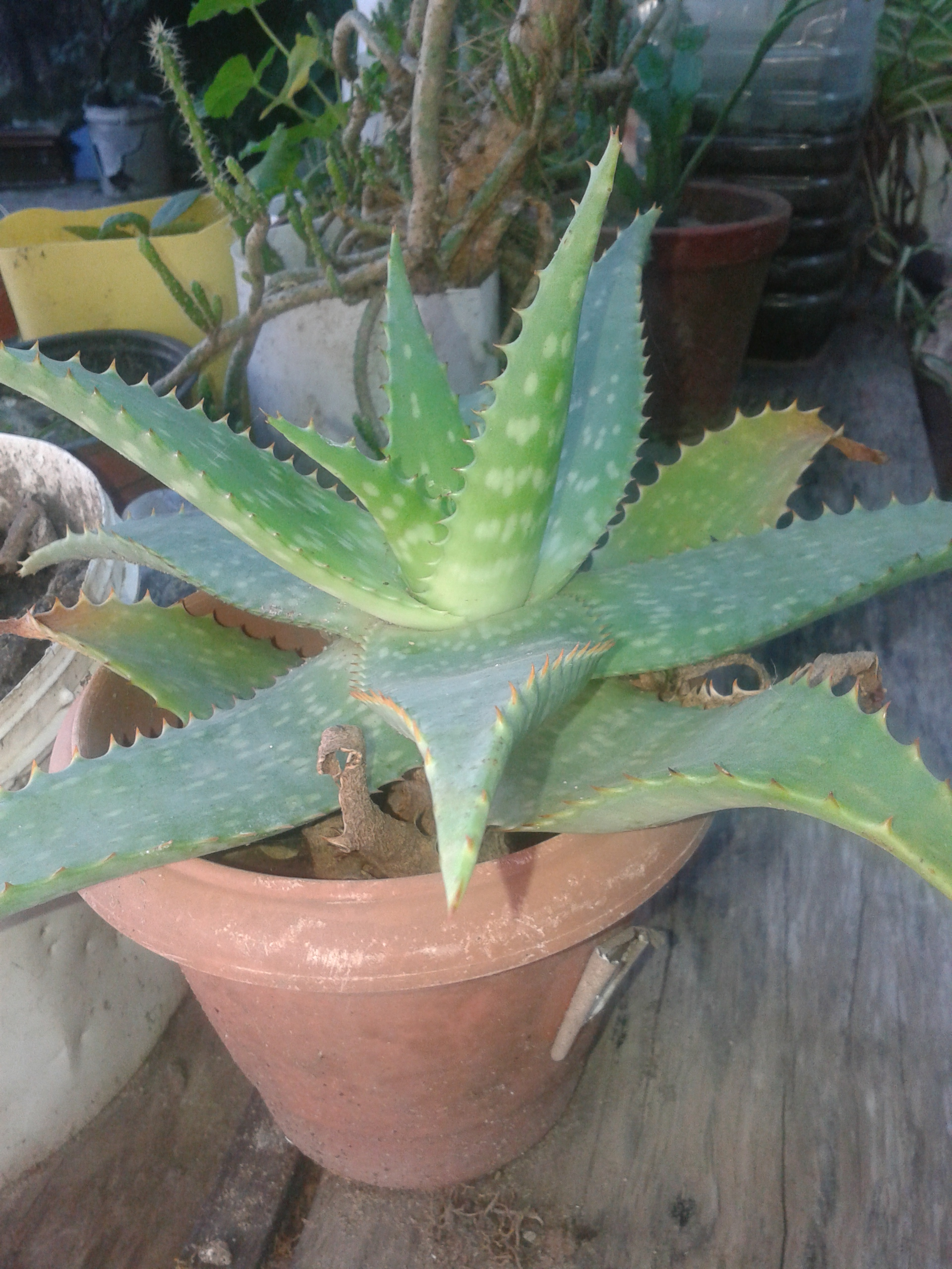 Aloe maculata en Maceta